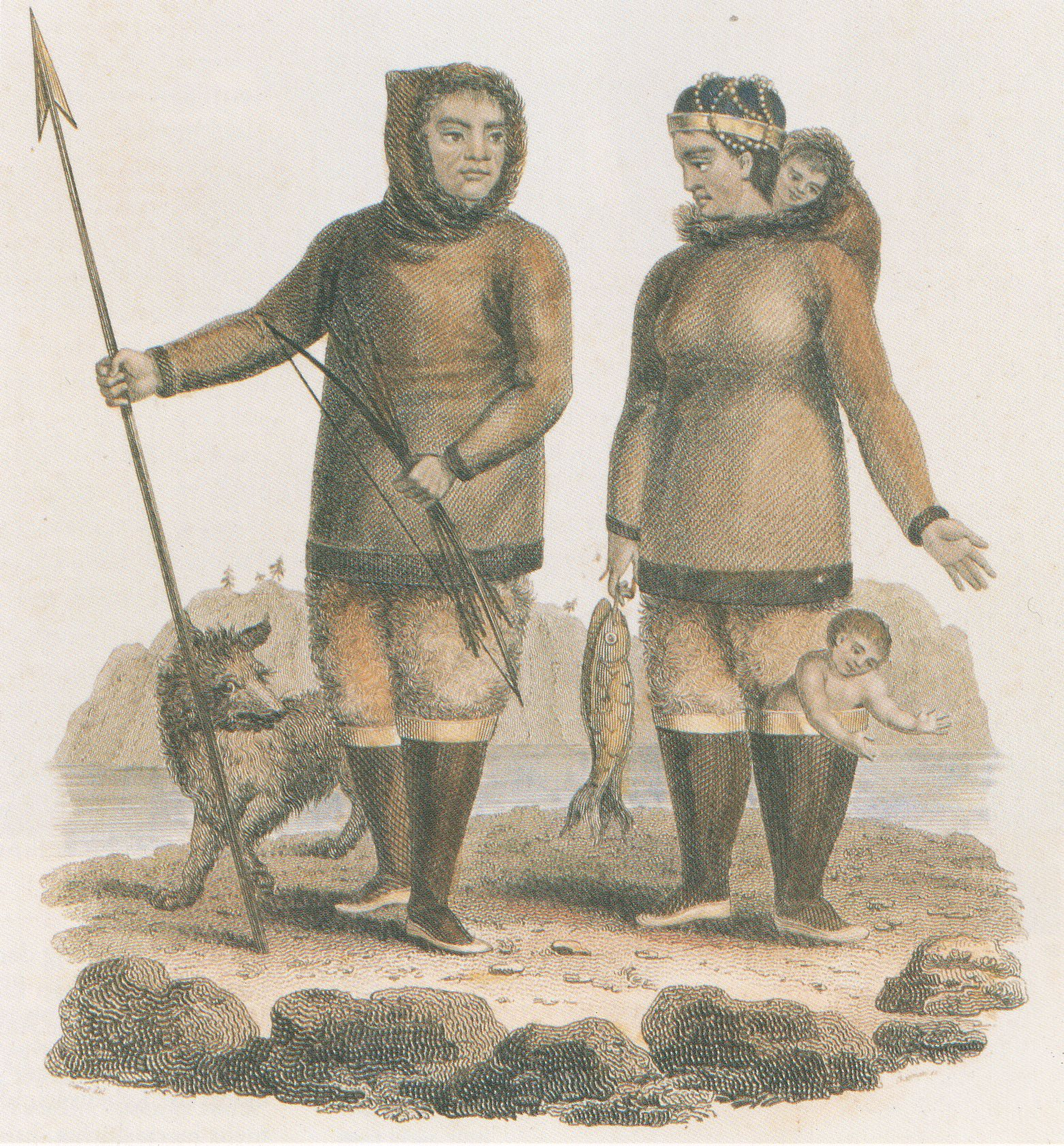 Labrador Eskimoindianer von der Küste Labradors, nach den Berichten eines Herrnhuter Missionars. 1812. Das Bild stellt Inuit dar, die Robbenfellstiefel mit gebleichter Sohle und Borte tragen. Nachdruck einer handkolierten Radierung.